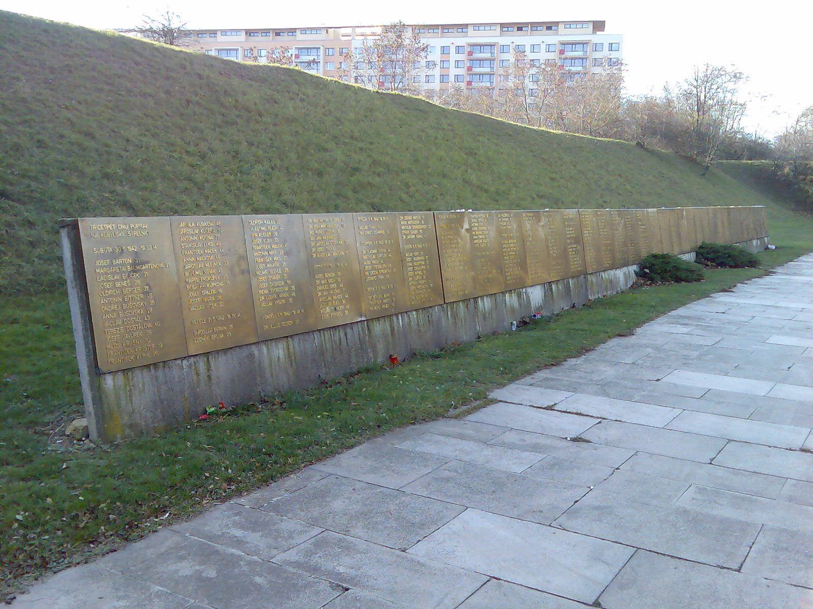 Kobyliská střelnice - desky se jmény popravených